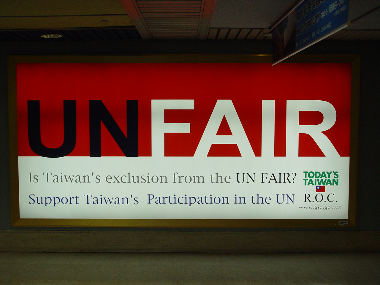 台灣加入聯合國的文宣。行政院新聞局將此文宣放在中正國際機場以向世界各國人民表達台灣加入聯合國的慾望。 文宣內容：台灣被置於聯合國之外，公平嗎？支持台灣加入聯合國。